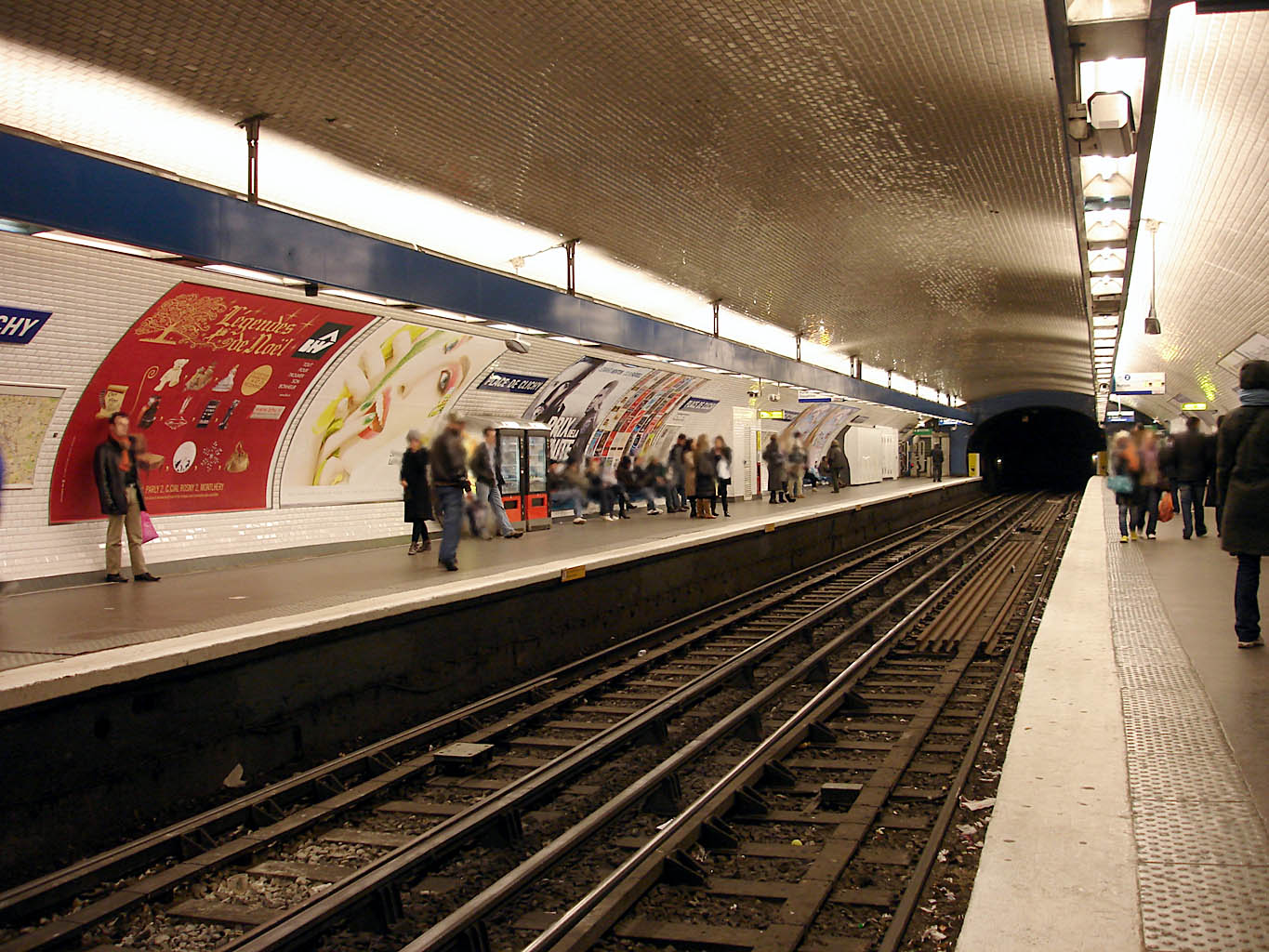 Station Place de Clichy de la ligne 2 du métro de Paris, France.